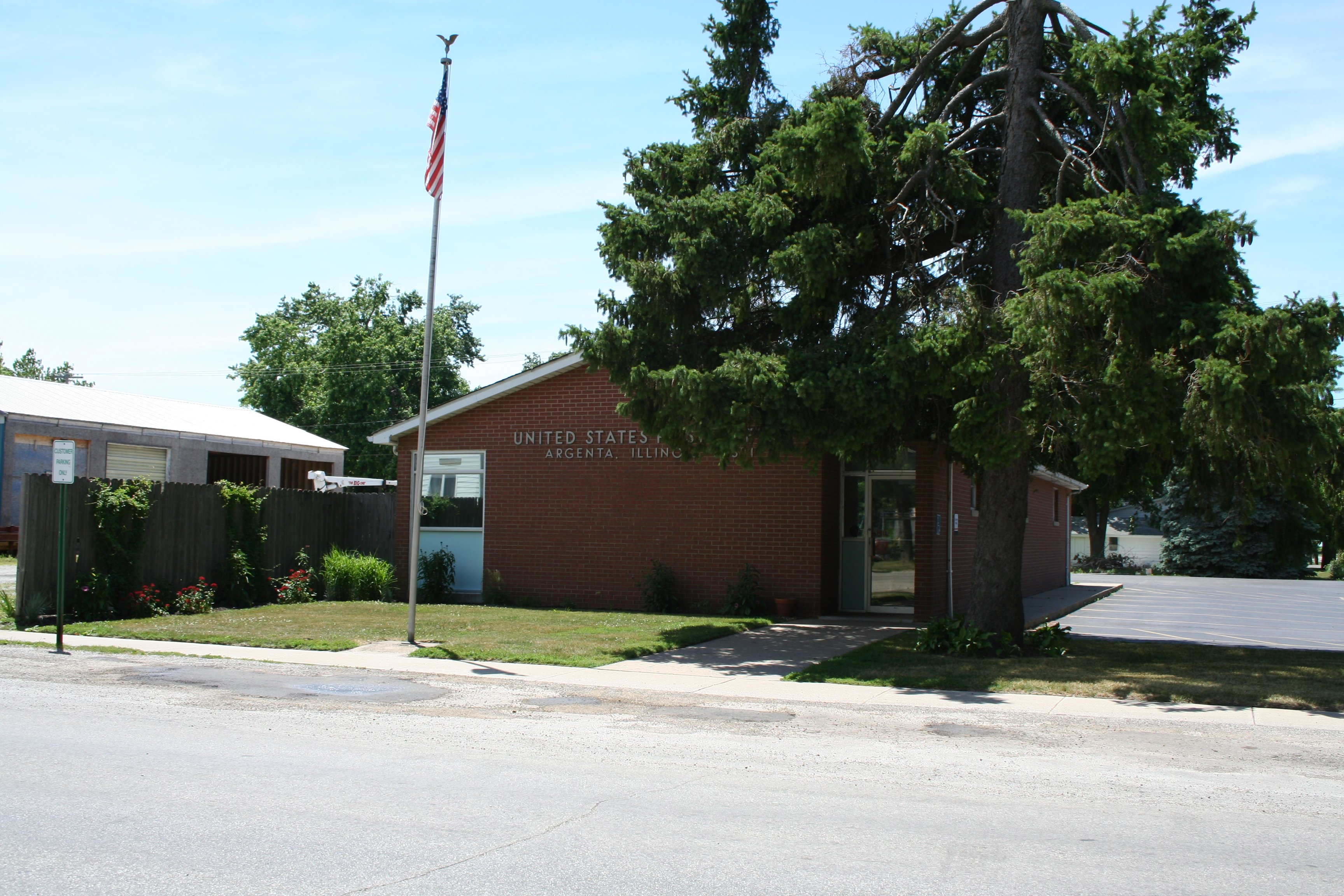 Argenta_Illinois_Post_Office